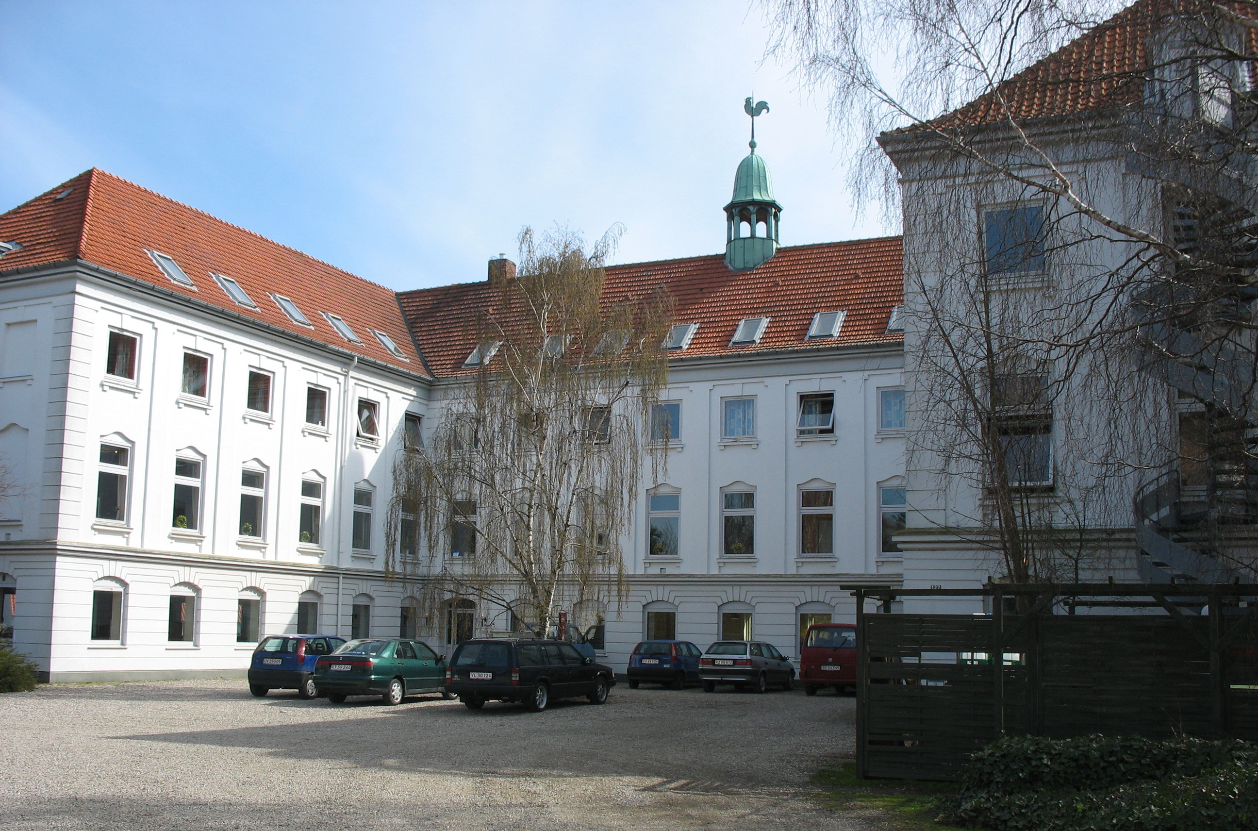 Odsherreds Efterskole Dette billed viser ikke Fåreveje Fri- og Efterskole. Billedet viser Odsherreds Efterskole som også ligger i Fårevejle by.